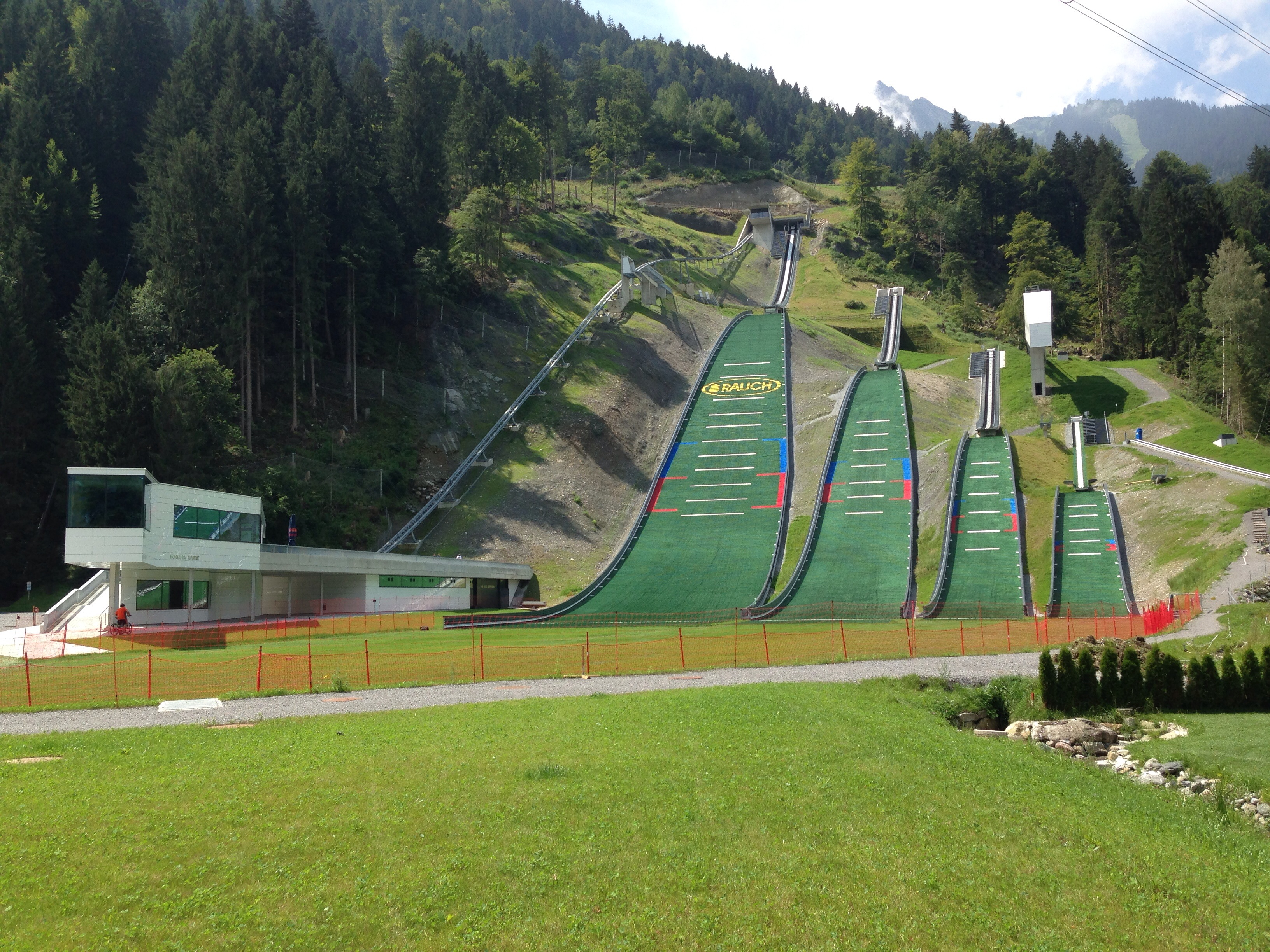 Das neu errichtete Montafoner Schanzenzentrum im Sommer 2014